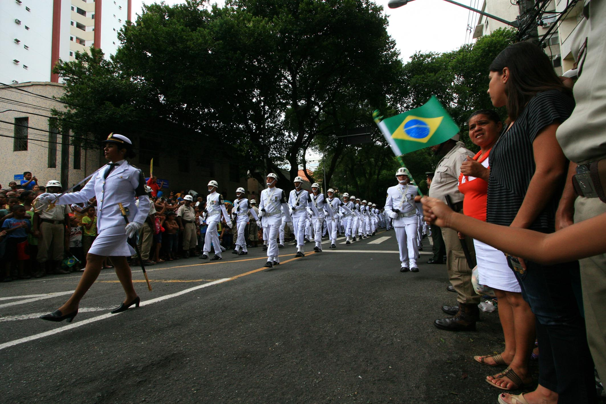 Desfile em Salvador, Bahia, homenageia o Dia da Independência do Brasil.